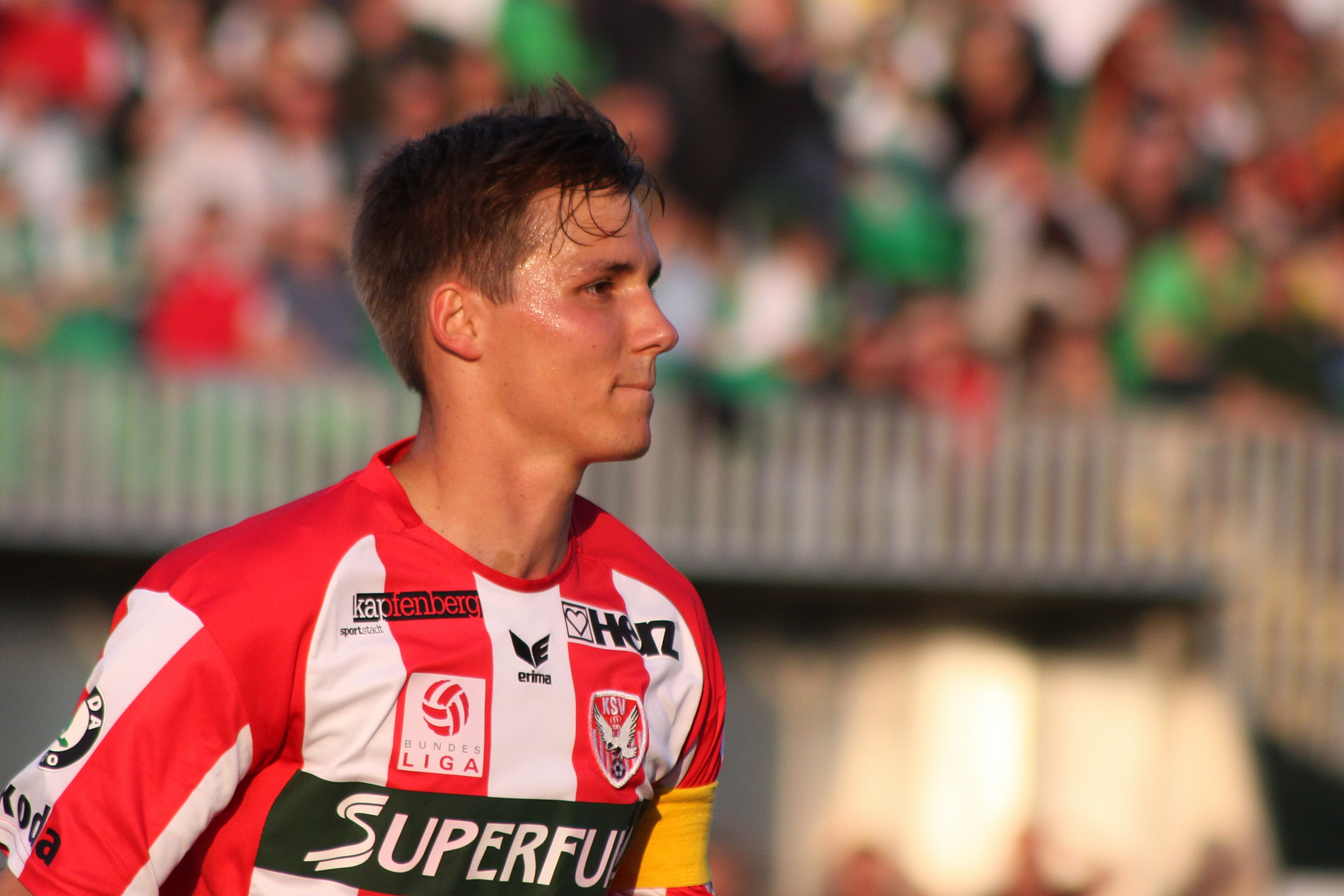 Dominique Taboga – Kapfenberger SV (quer)